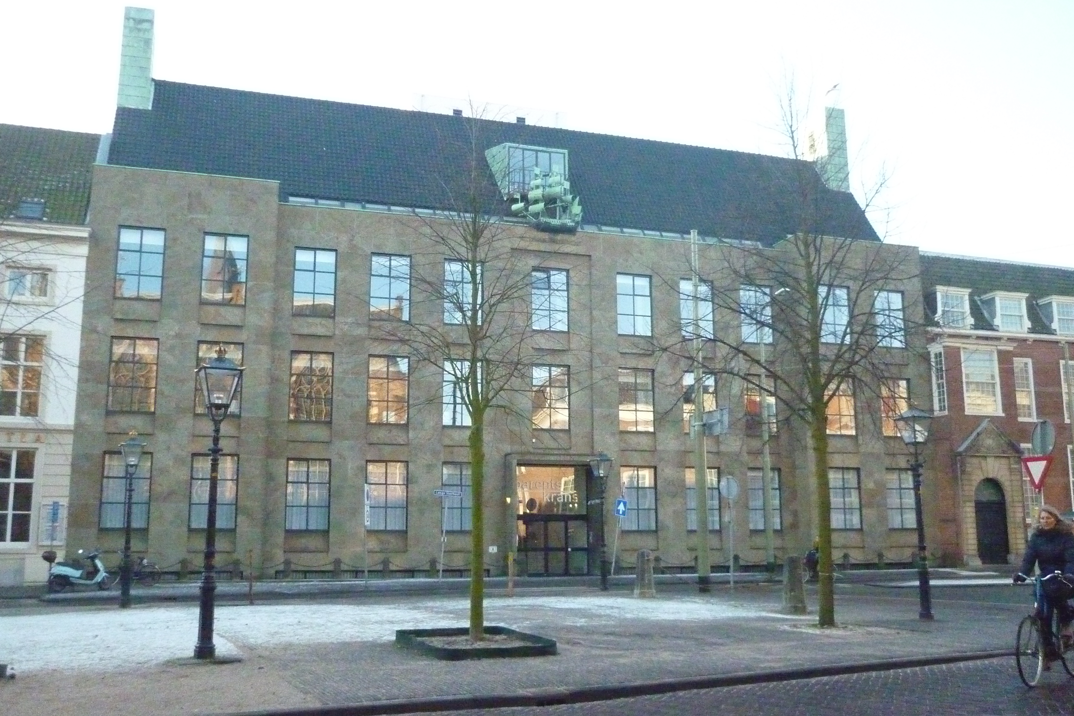 Voormalig kantoor van De Zeven Provinciën aan het Lange Voorhout in Den Haag